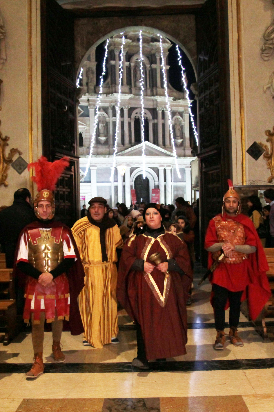 Entrata in cattedrale della Sacra Famiglia il Natale del 2013, sullo sfondo la chiesa di San Sebastiano